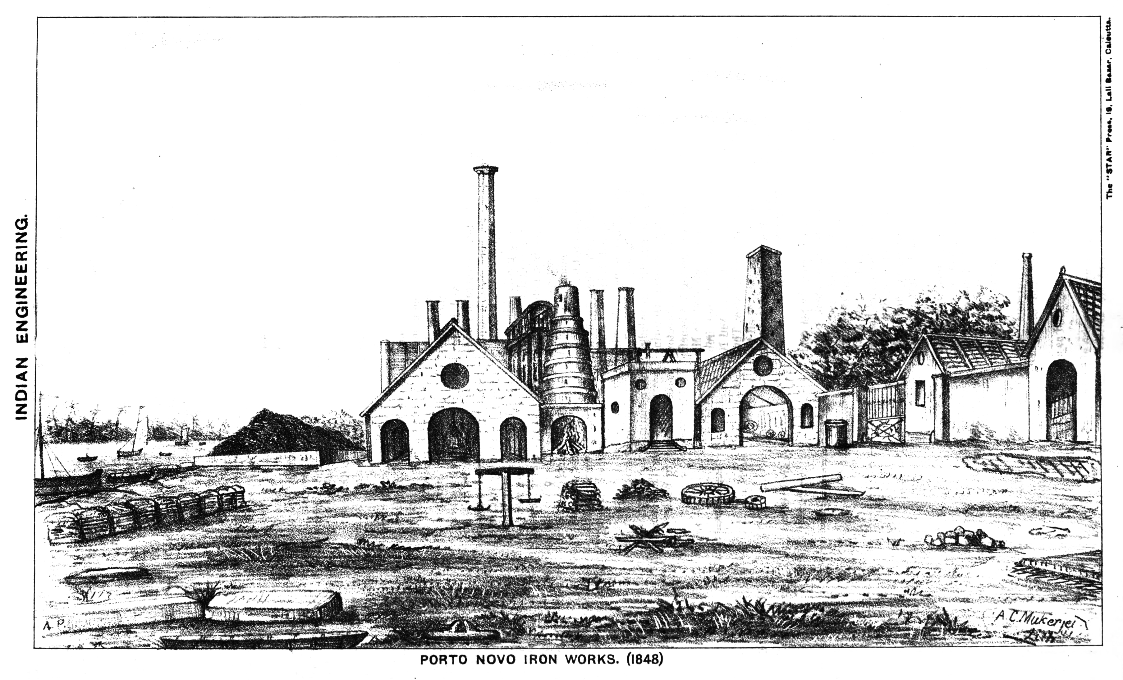 Porto Novo Iron works 1848. Oldest steel plant in India.